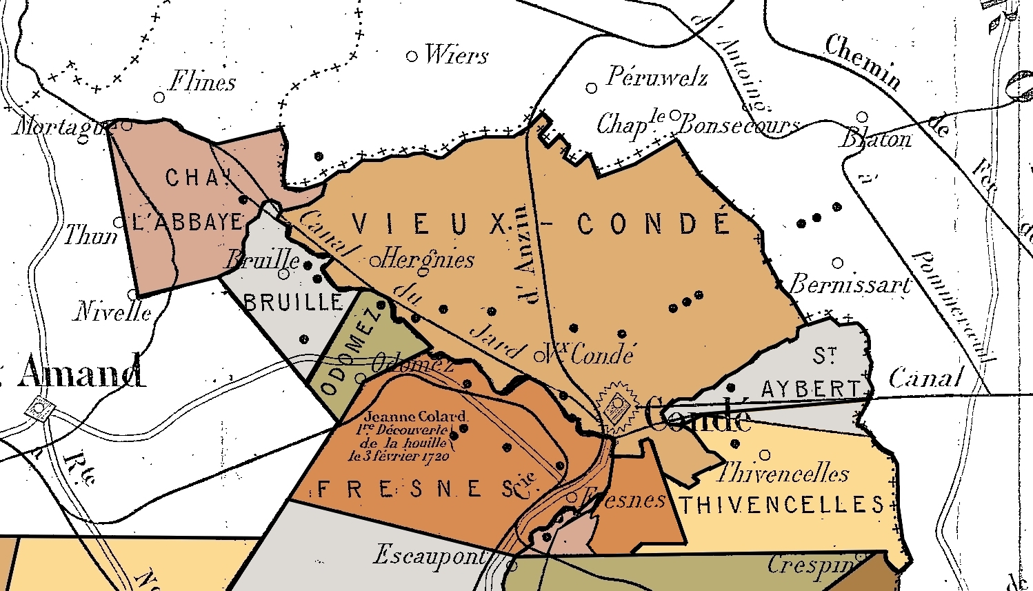 Carte de la concession de Vieux-Condé vers 1880. La carte a été colorisée par JÄNNICK Jérémy.